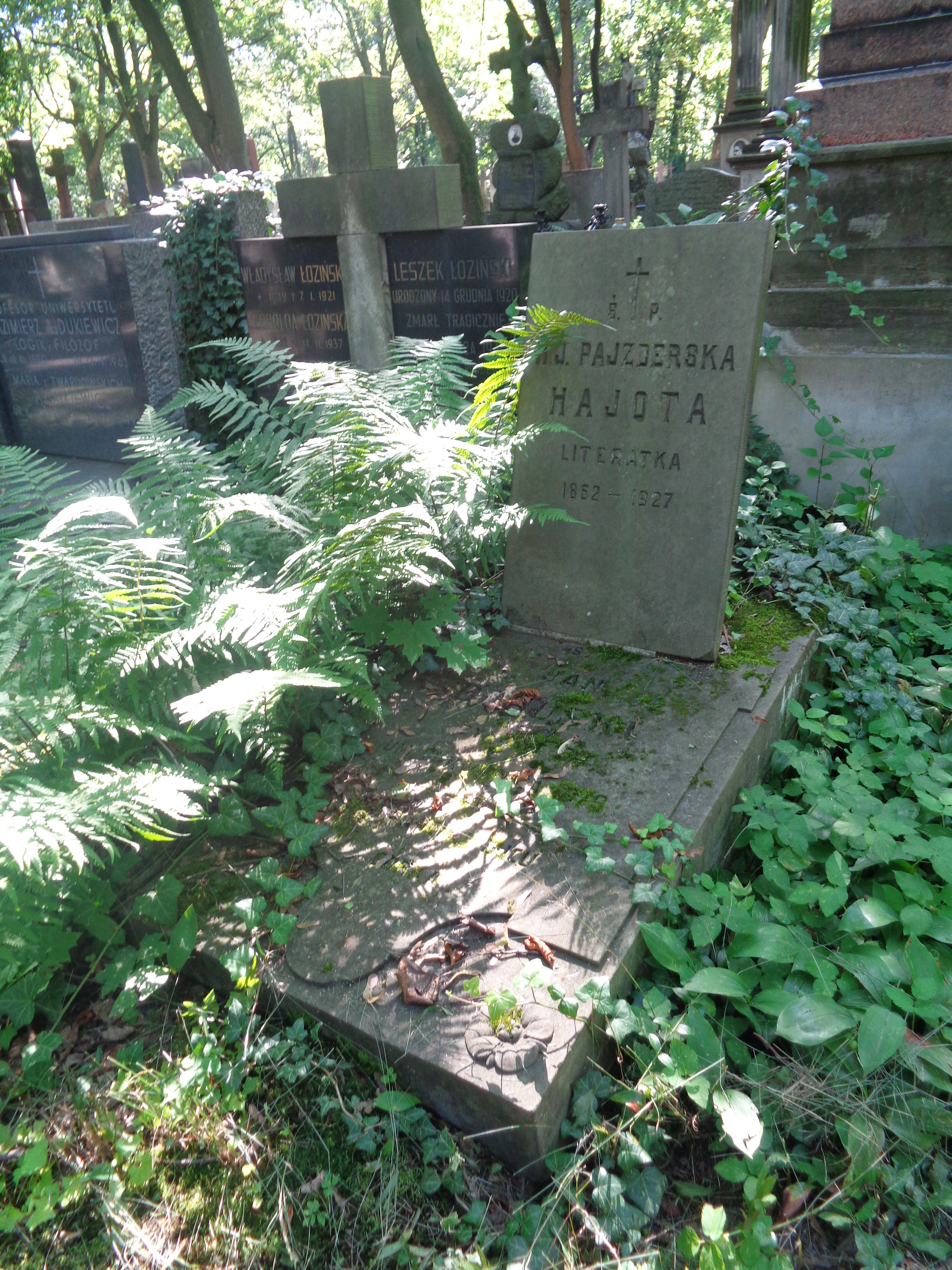 Grób Heleny Janiny Pajzderskiej na Cmentarzu Powązkowskim w Warszawie